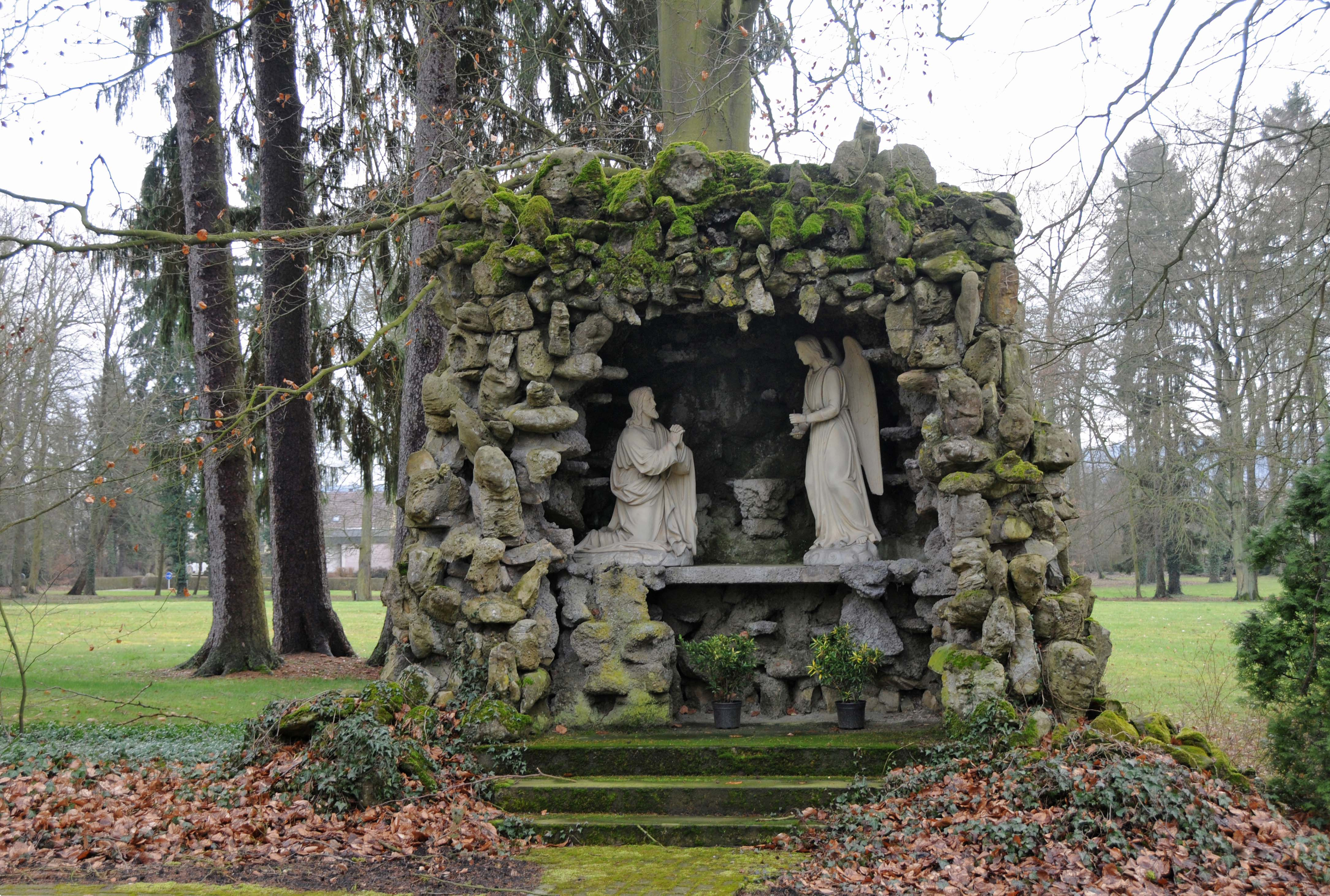 Sujet: Grotte am Park zu Heeschdref Auteur: User: Cayambe Source: Eege Foto Lizenz: Creative Commons